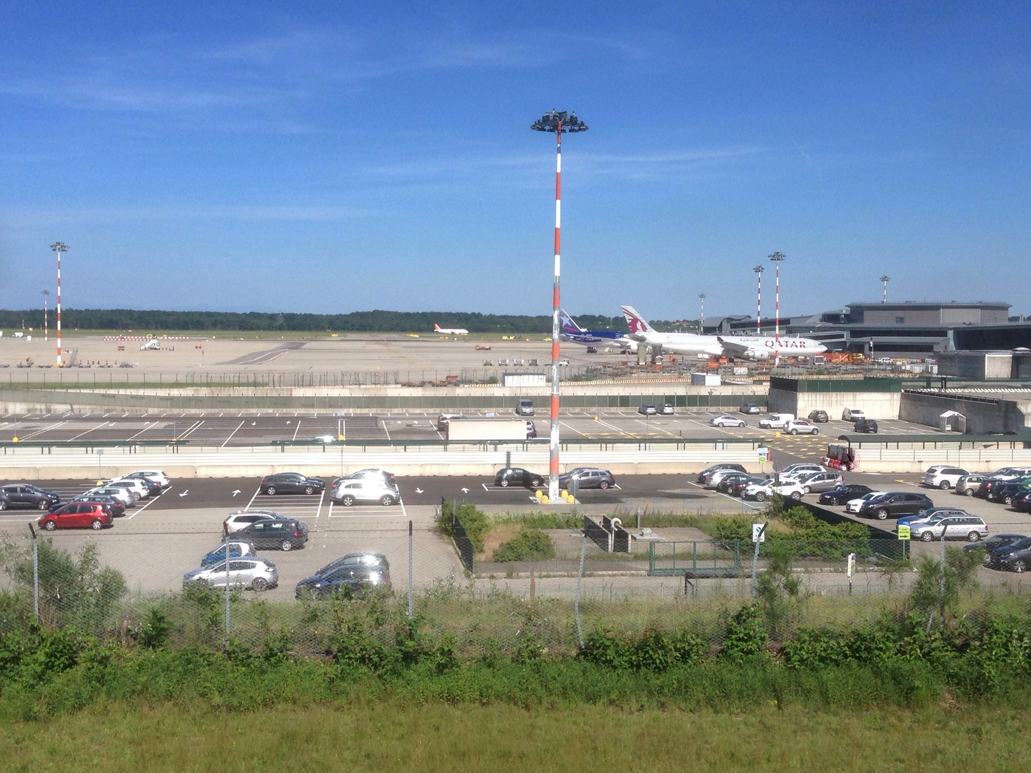 Somma Lombardo - Malpensa